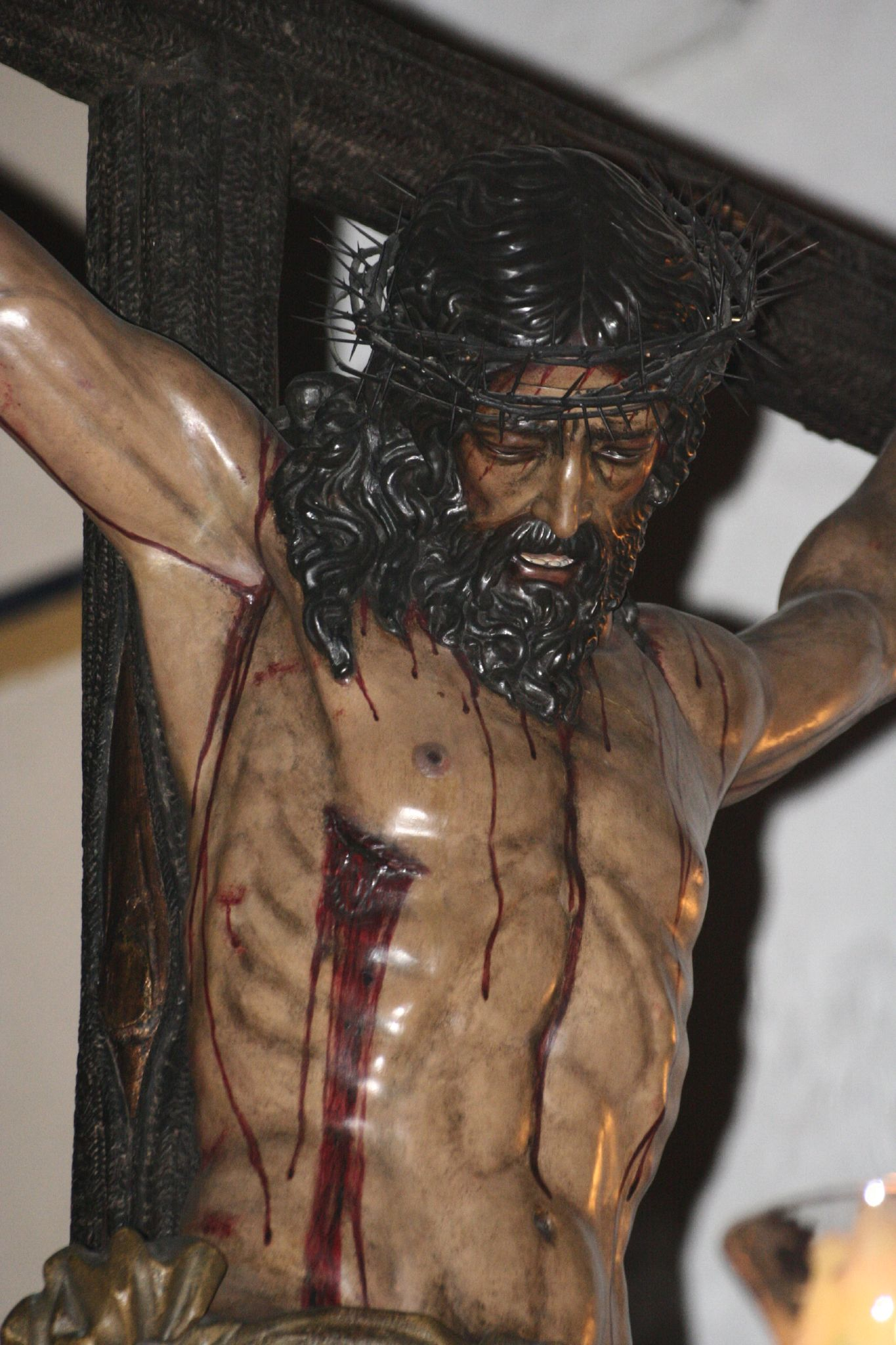 Cristo de las Almas. Semana Santa en Sevilla. Año 2006 Foto realizada y propiedad de Ángel Cachón